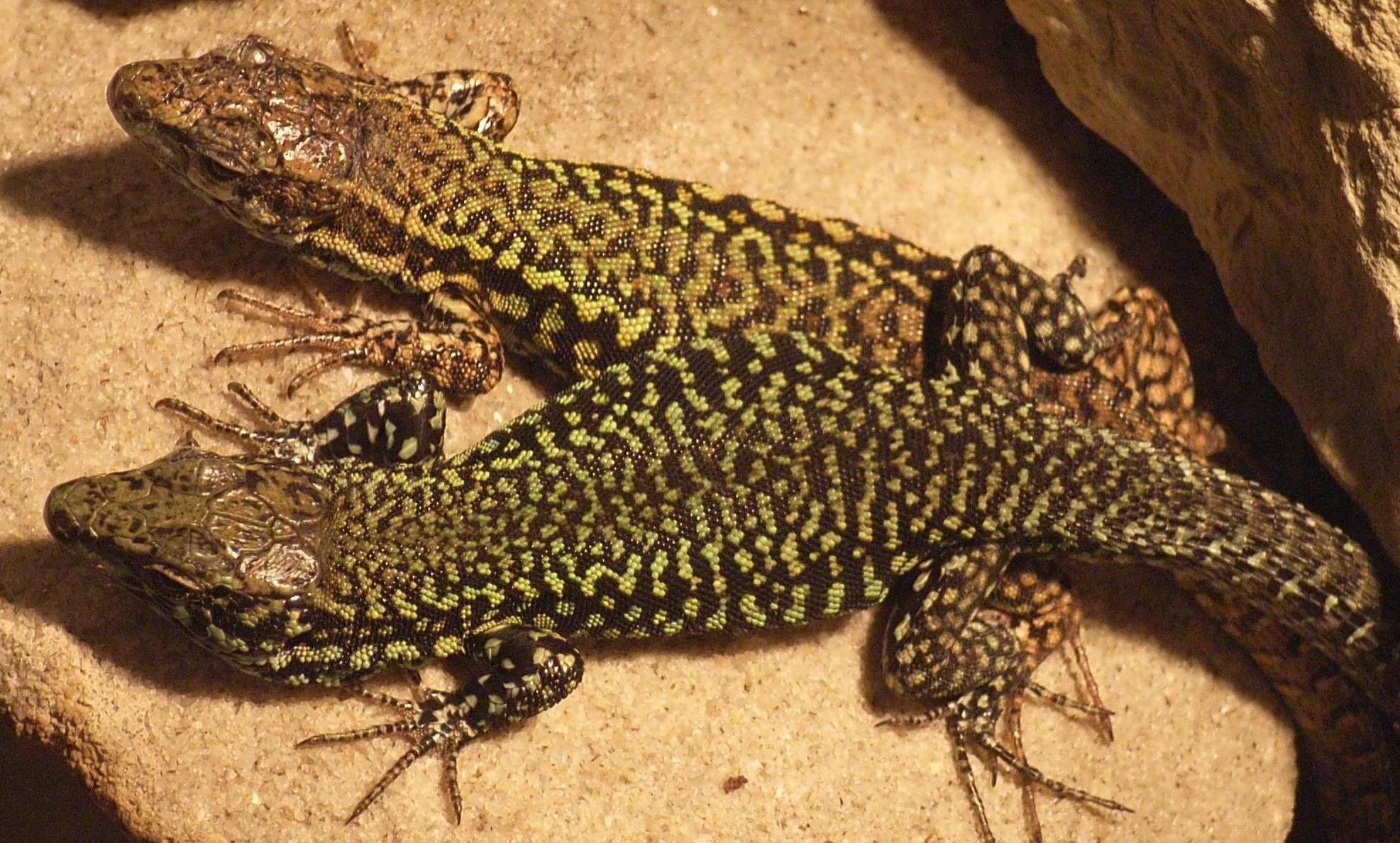 Ein Pärchen Italienischer Mauereidechsen (Podarcis muralis nigriventris), im Terrarium aufgenommen